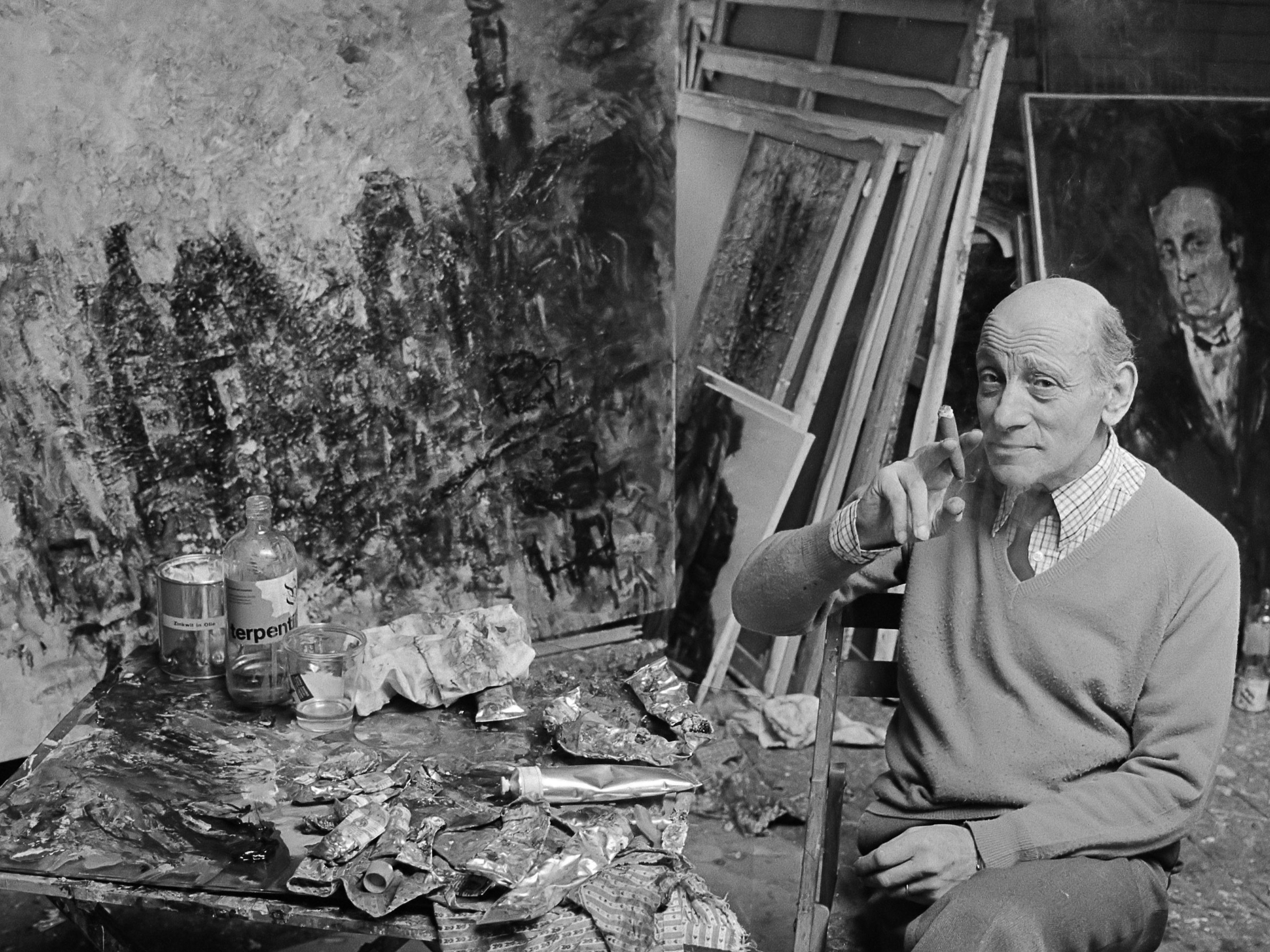 Schilder Anton Buytendijk in zijn atelier 10 maart 1983